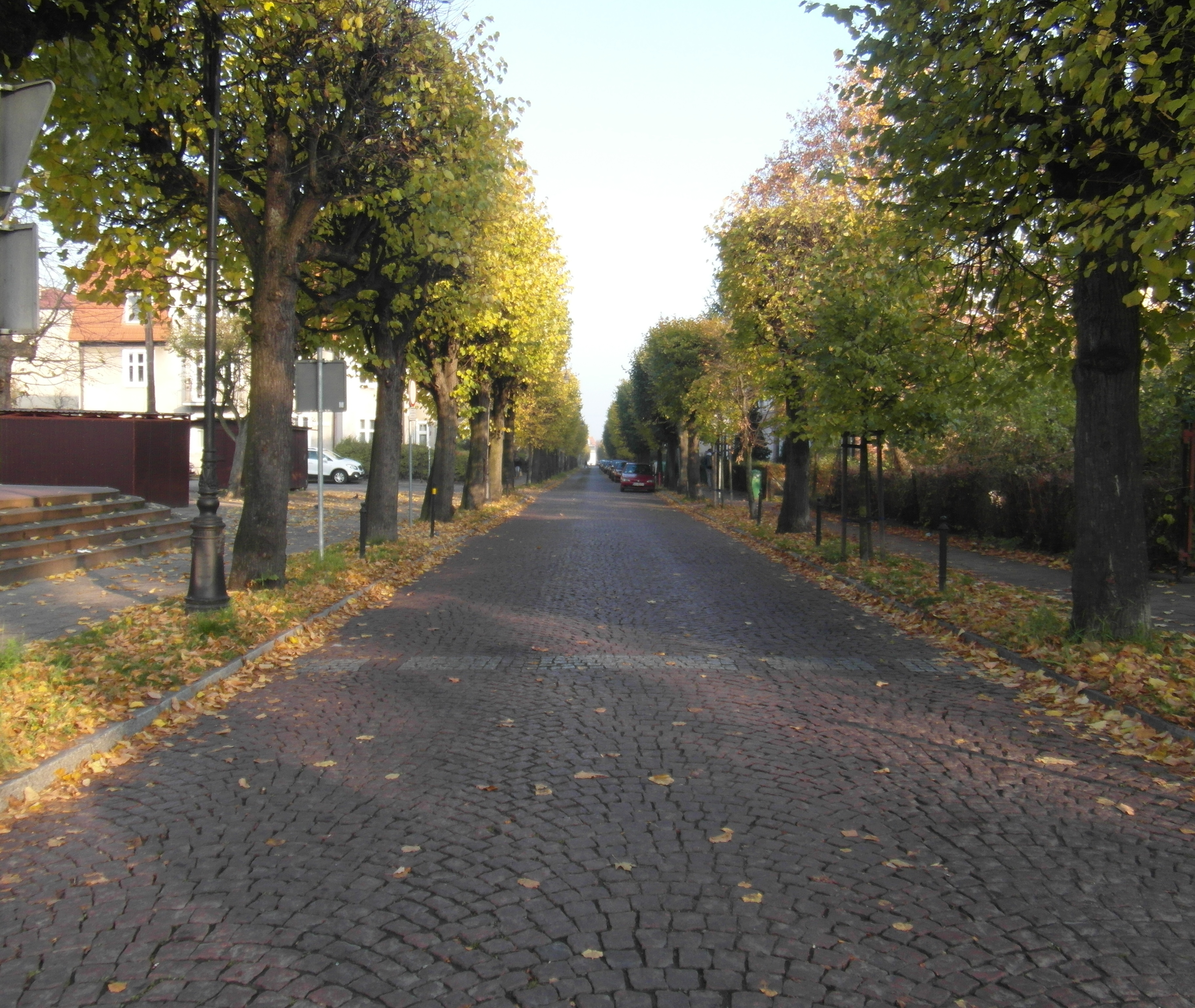 Ul. Obrońców Westerplatte, jedna z piękniejszych ulic Oliwy.